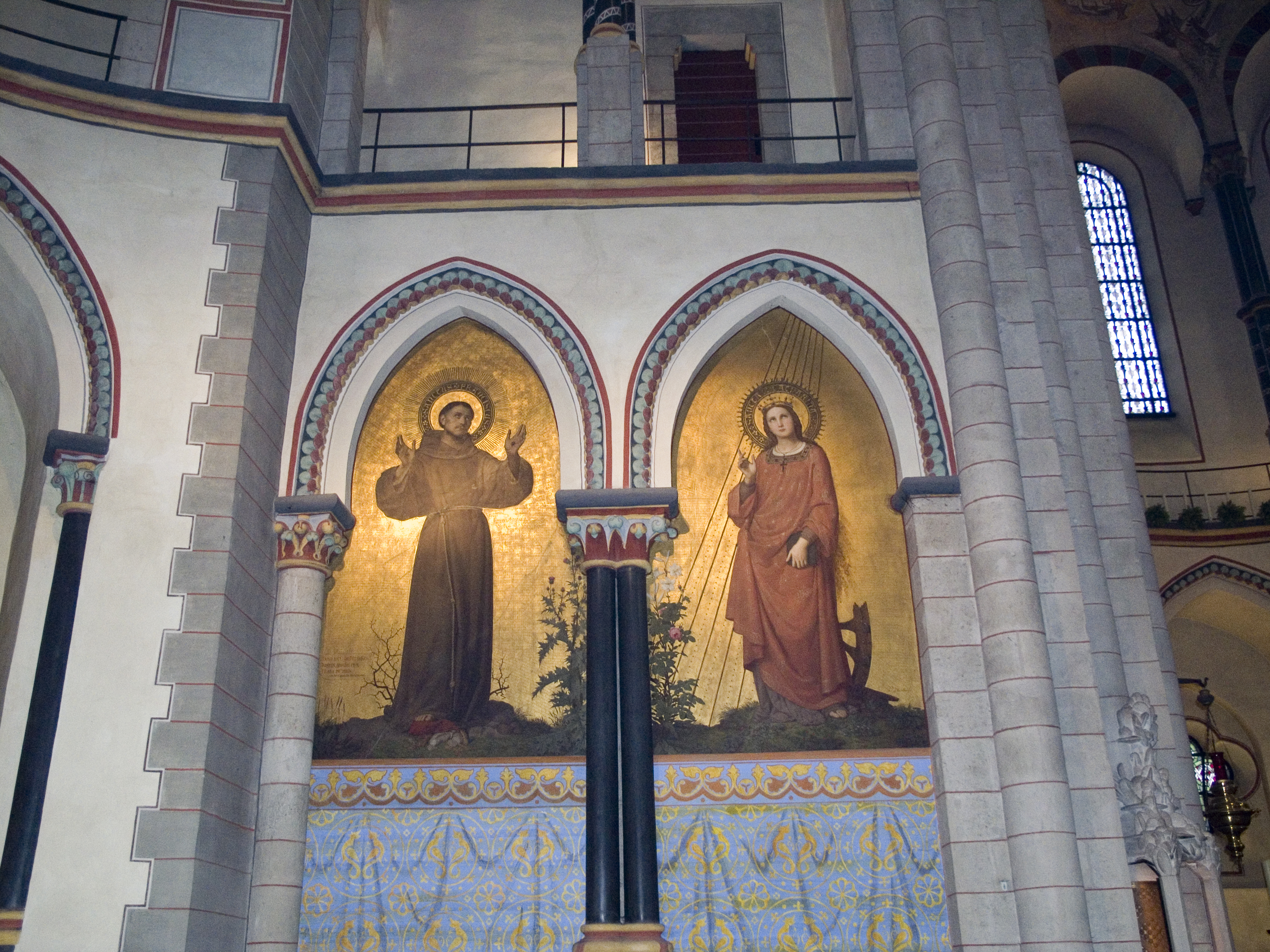 Северный Рейн-Вестфалия, Нойс - Базилика Святого Квиринуса